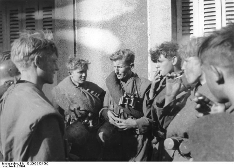 Scherl Bilderdienst: Marschpause während eines Stellungswechsels. Im Verbande des im Wehrmachtsbericht hervorragend genannten Flakregiments Oberst Hermann bestanden auch RAD Flakeinheiten ihren kämpferischen Einsatz. Prop.Kp. RAD - RAD-Kriegsberichter Ostfm. Arnold Film-Nr. 321-Neg.Nr.:34A 369-44